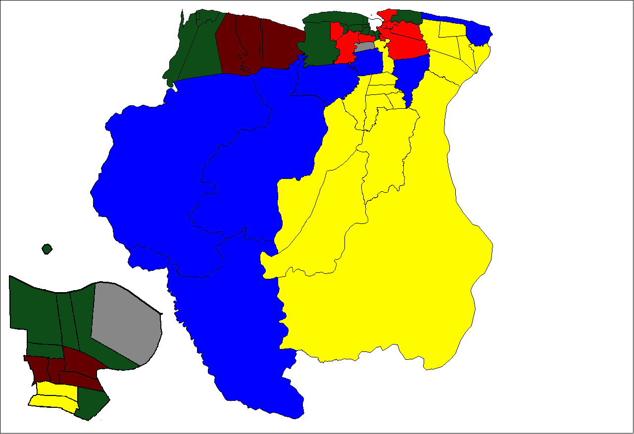 Deze kaart toont per Surinaams ressort welke bevolkingsgroep het grootst is. De gebruikte gegevens zijn die van census 8. Legenda: Gemengd Creolen Hindoestanen Marrons Javanen Indianen Als template werden file:Suriname_resorts.png en file:Resorts in Paramaribo, Suriname - 20061227.png gebruikt.